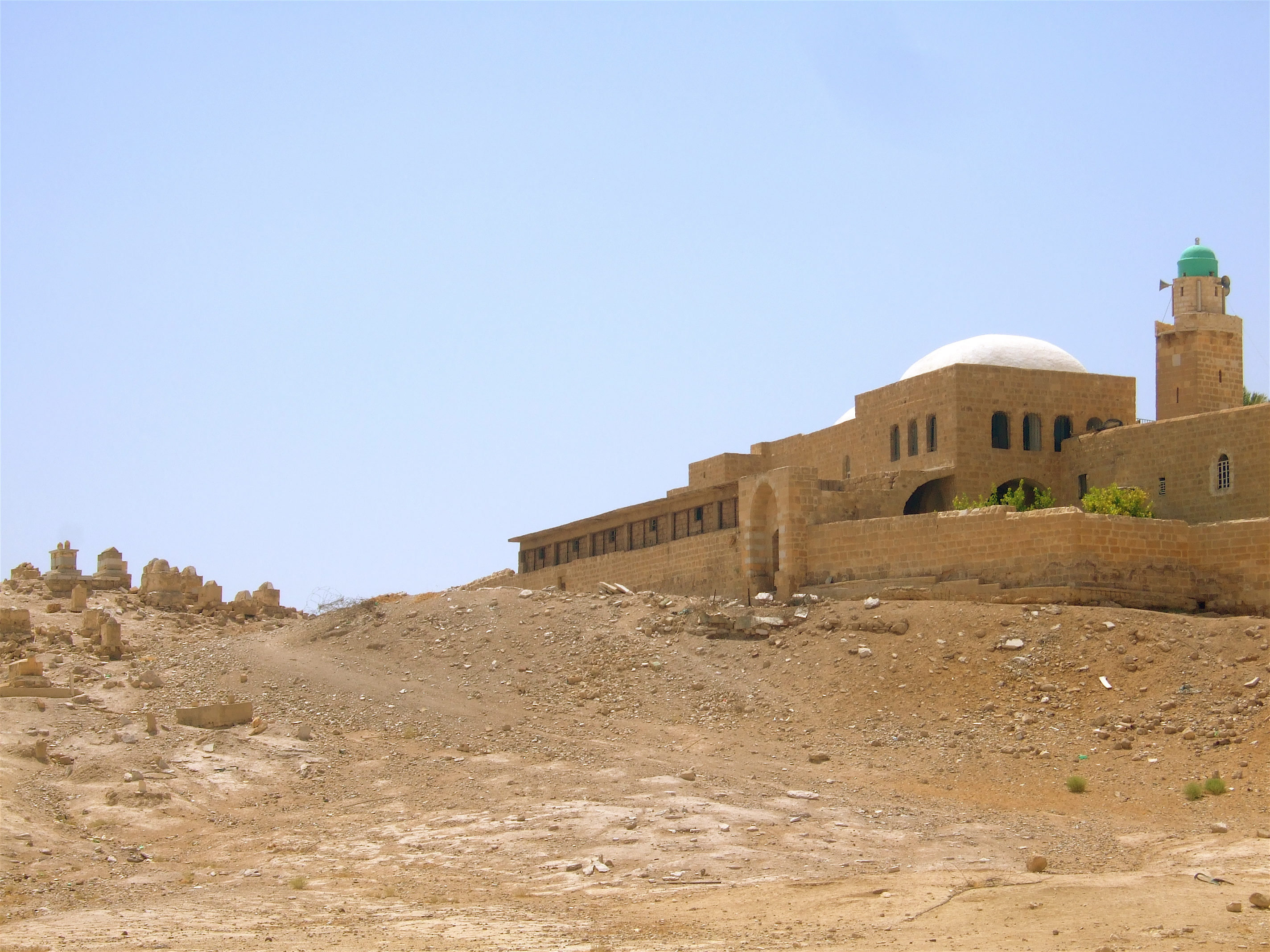 Nabi Musa, Palestine